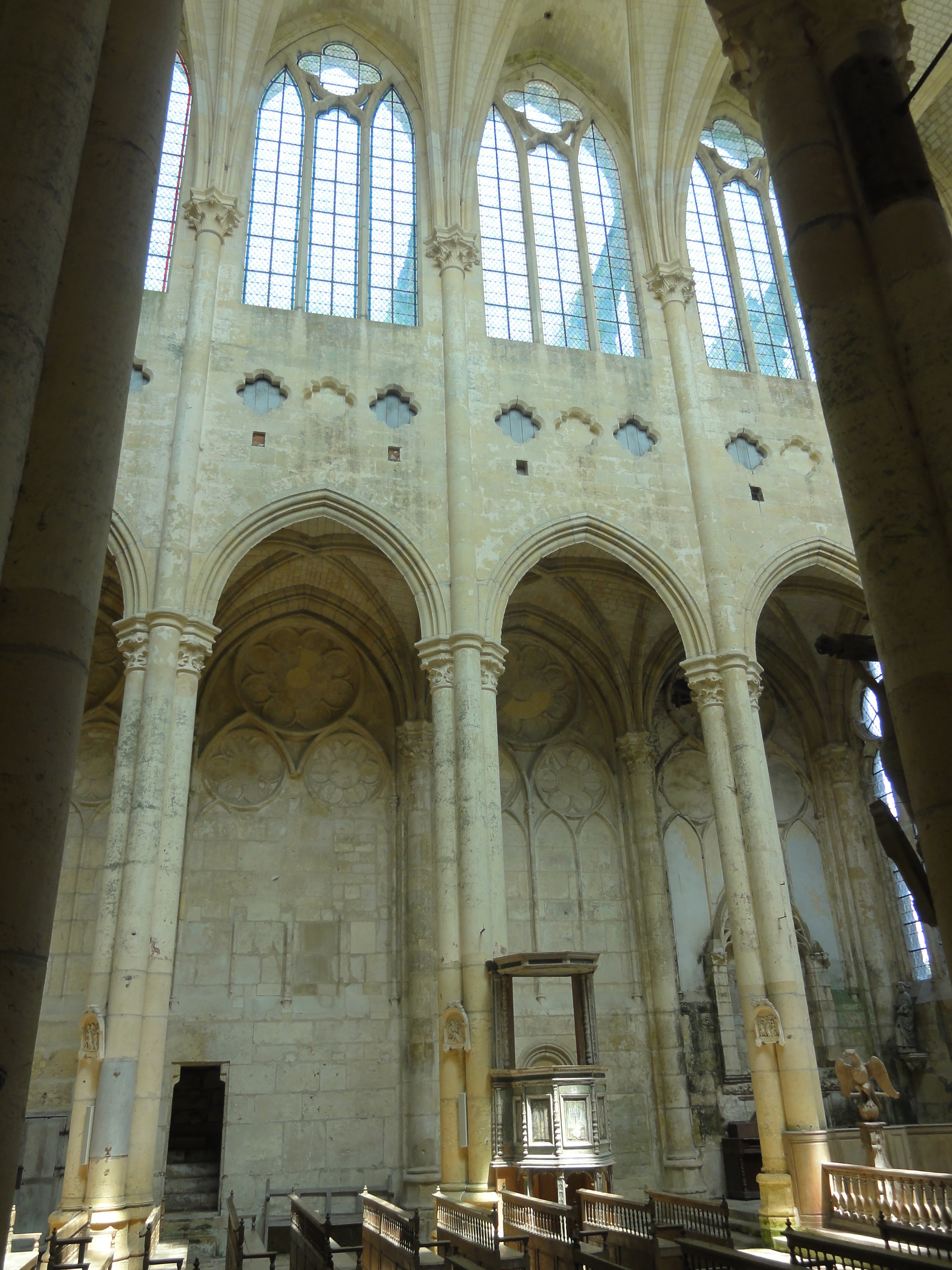 Elévation nord.